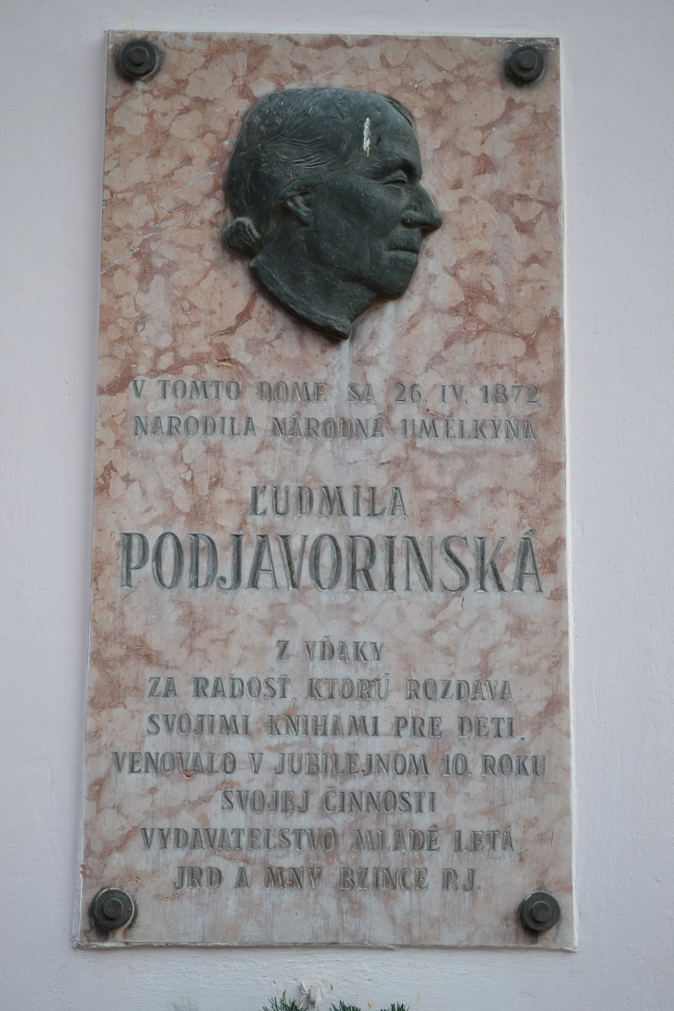 Pamätná tabuľa na rodnom dome Ľ. Podjavorinskej